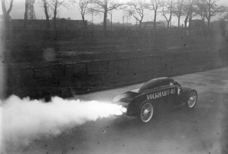 Der sensationelle Start des neuen Volkhard´schen Raketen-Autos auf der Avus in Berlin! Das Raketenauto im 60 km Tempo über die Avus.